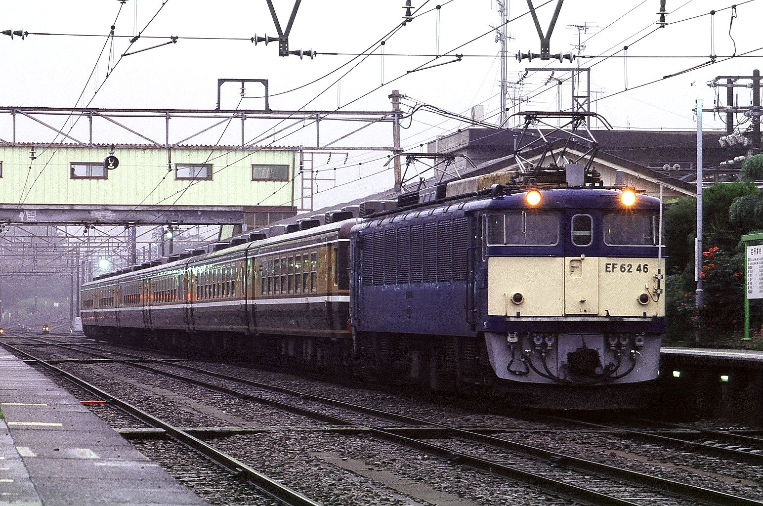 横川駅でのEF62 46、最後まで残ったEF62型の1両